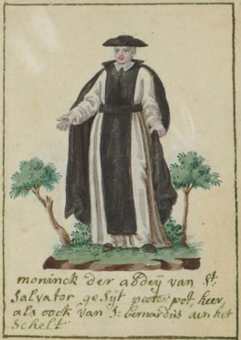 Monnik van de Sint-Salvatorabdij op het einde van de 18e eeuw (afbeelding uit Kleeding der vernitigde geestelijcke deser stad Antwerpen - 1800)